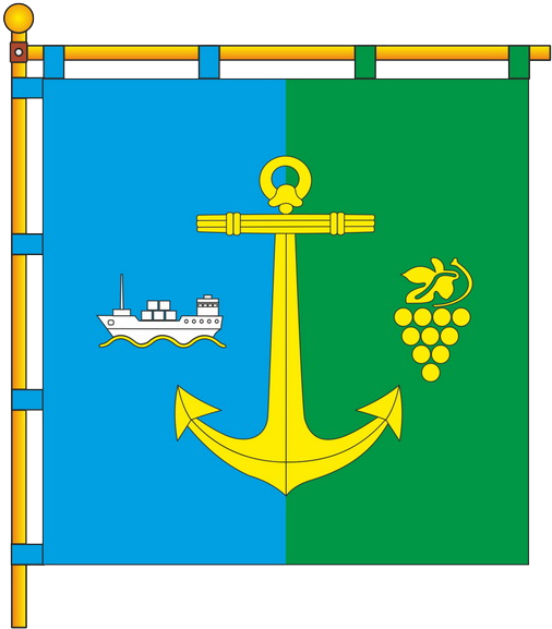 Прапор Рені